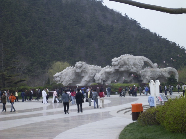 中国・大連市にある老虎灘の彫刻です